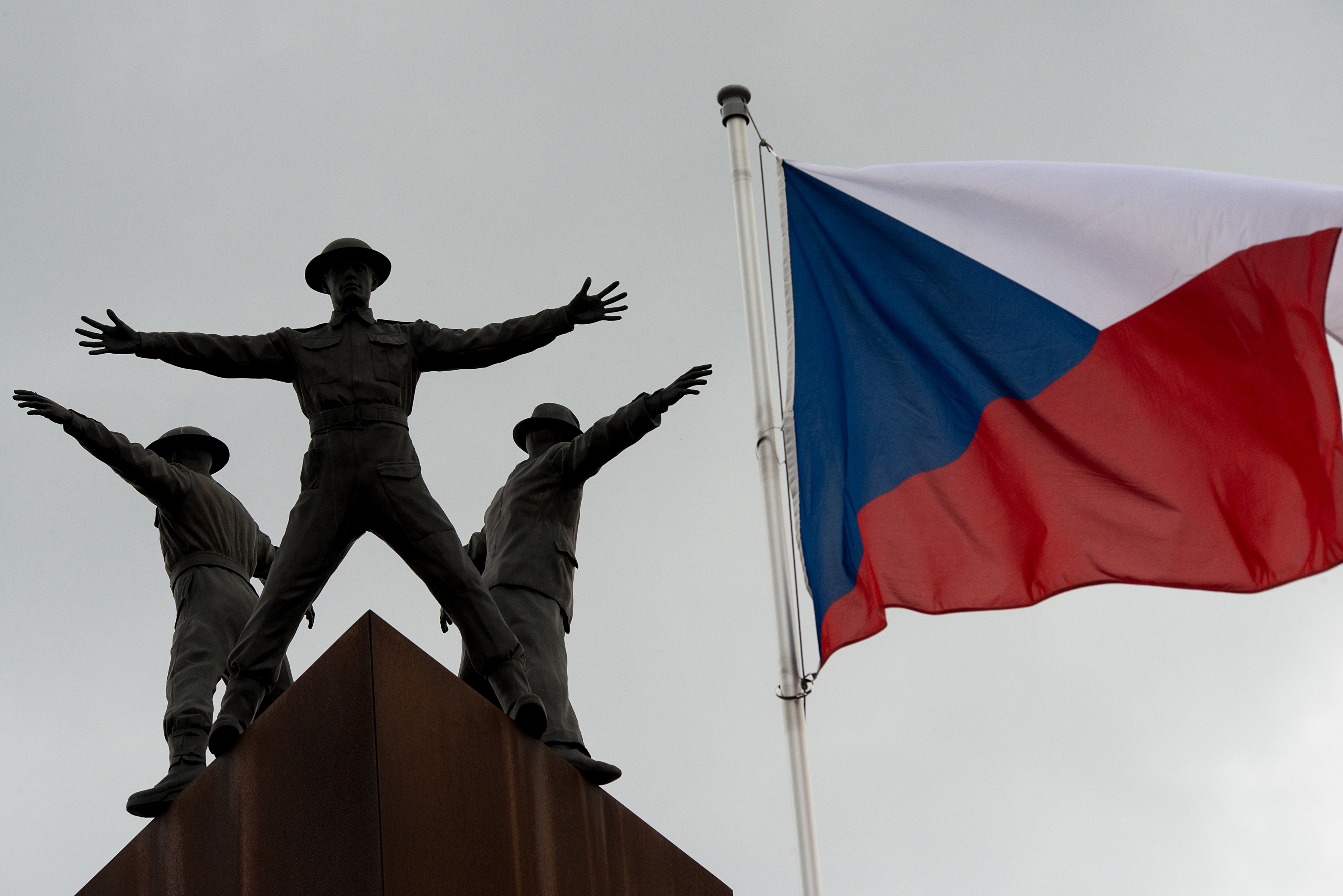 Denkmal der Operation Anthropoid Památník Operaci Anthropoid